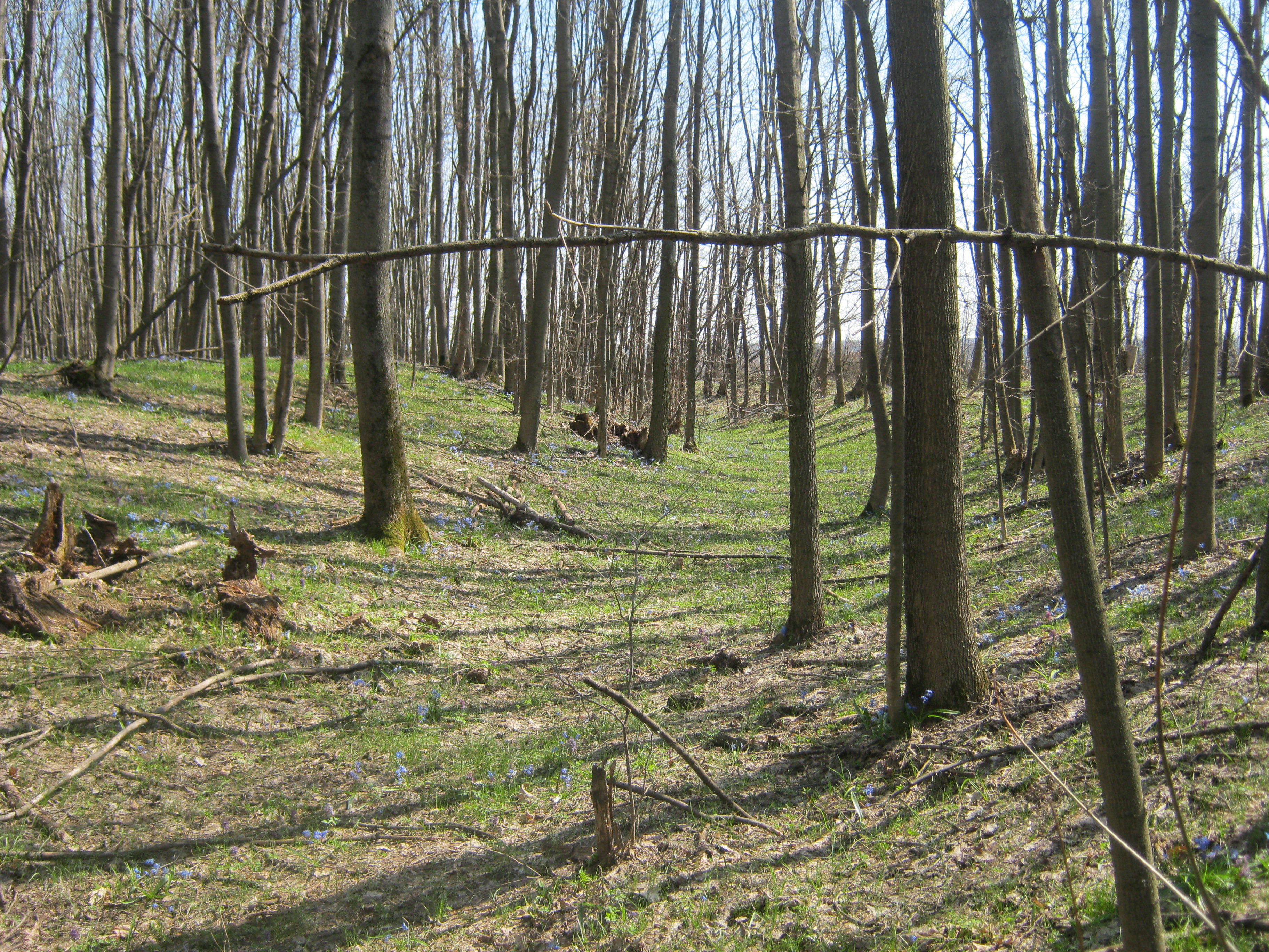 Городище скіфського часу, у 2 км на захід від селища